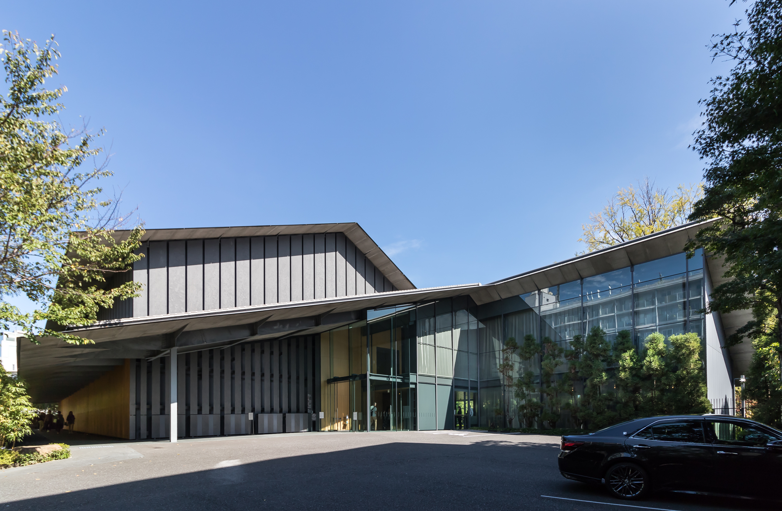 根津美術館。隈研吾設計。